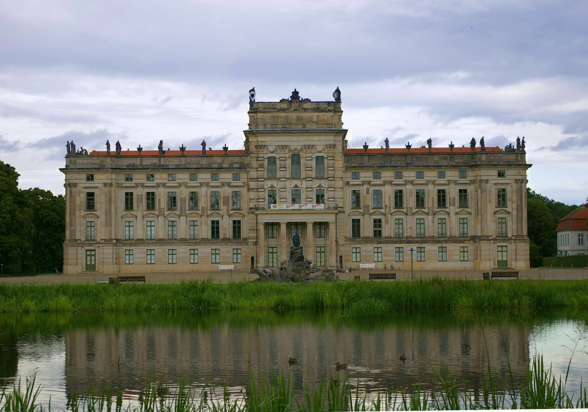 Barockschloss Ludwigslust